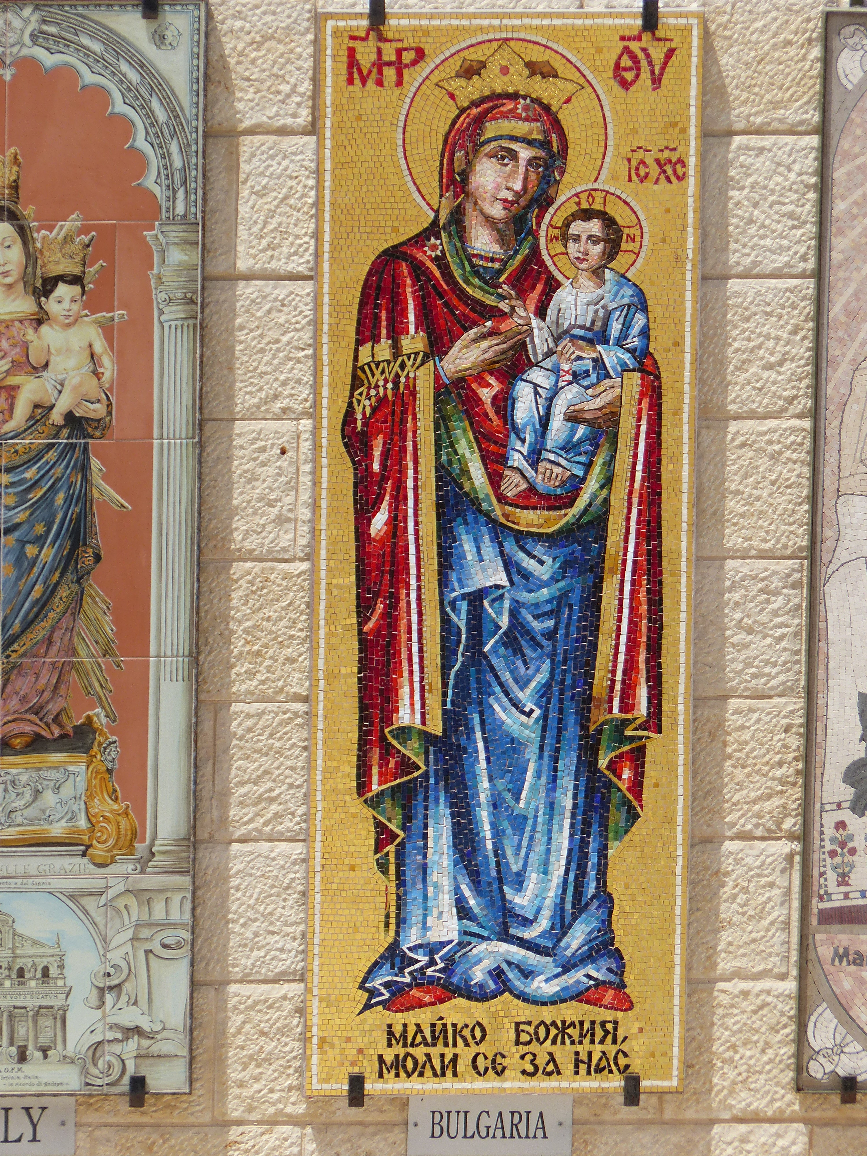 V Bulgaria, Nazaret, Israel, 2017